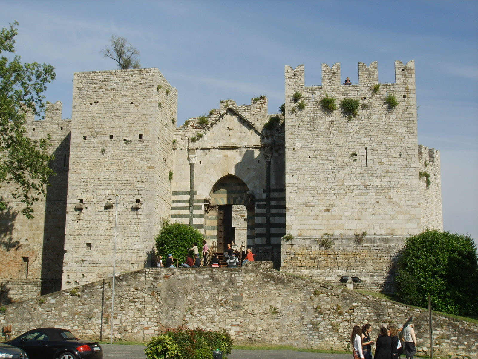 Castello dell'Imperatore, Prato, Italy